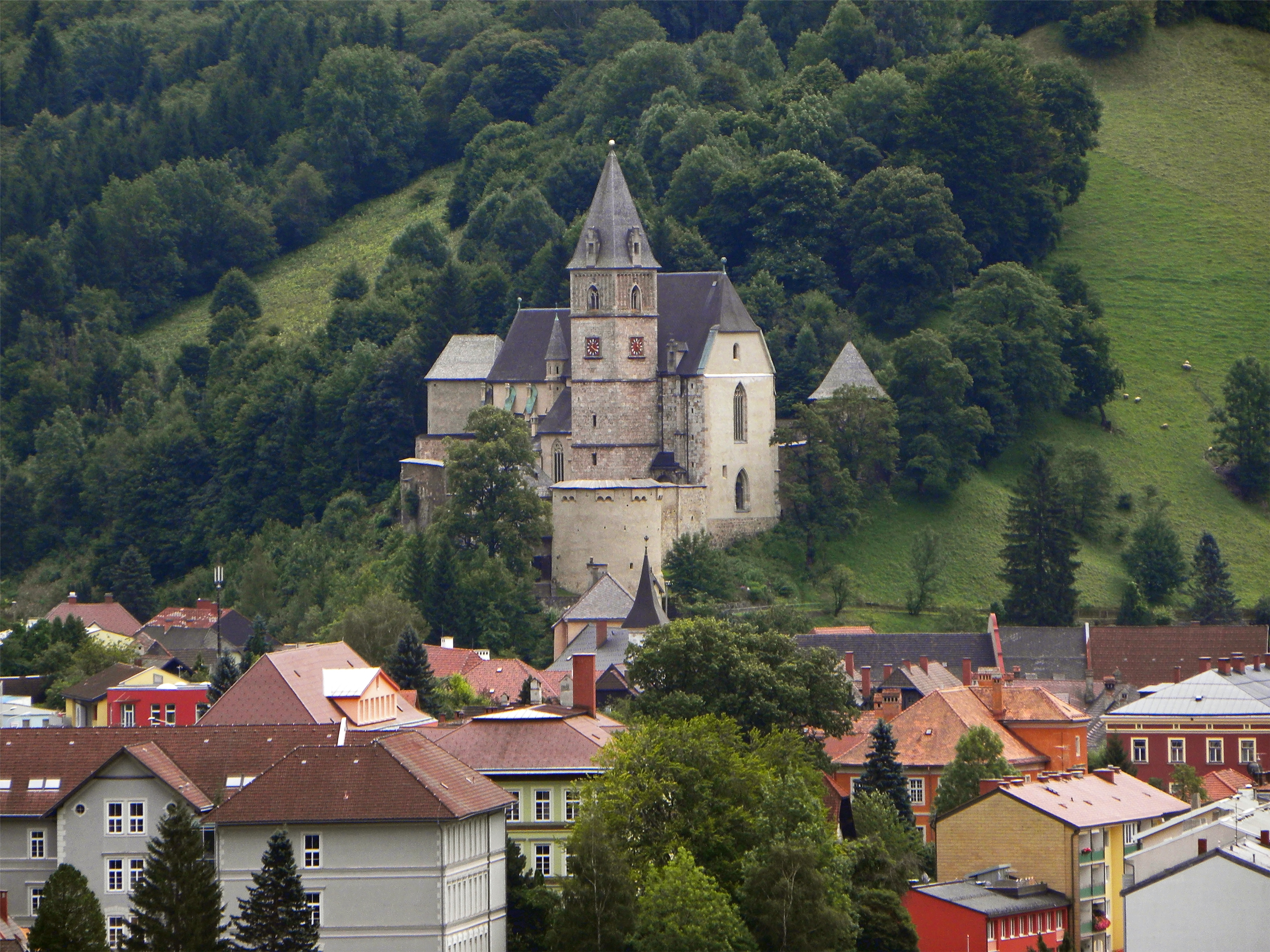 Kirchenfestungsanlage hl. Oswald mit Johanneskapelle und Kapellenbildstock mit Blick über Eisenerz